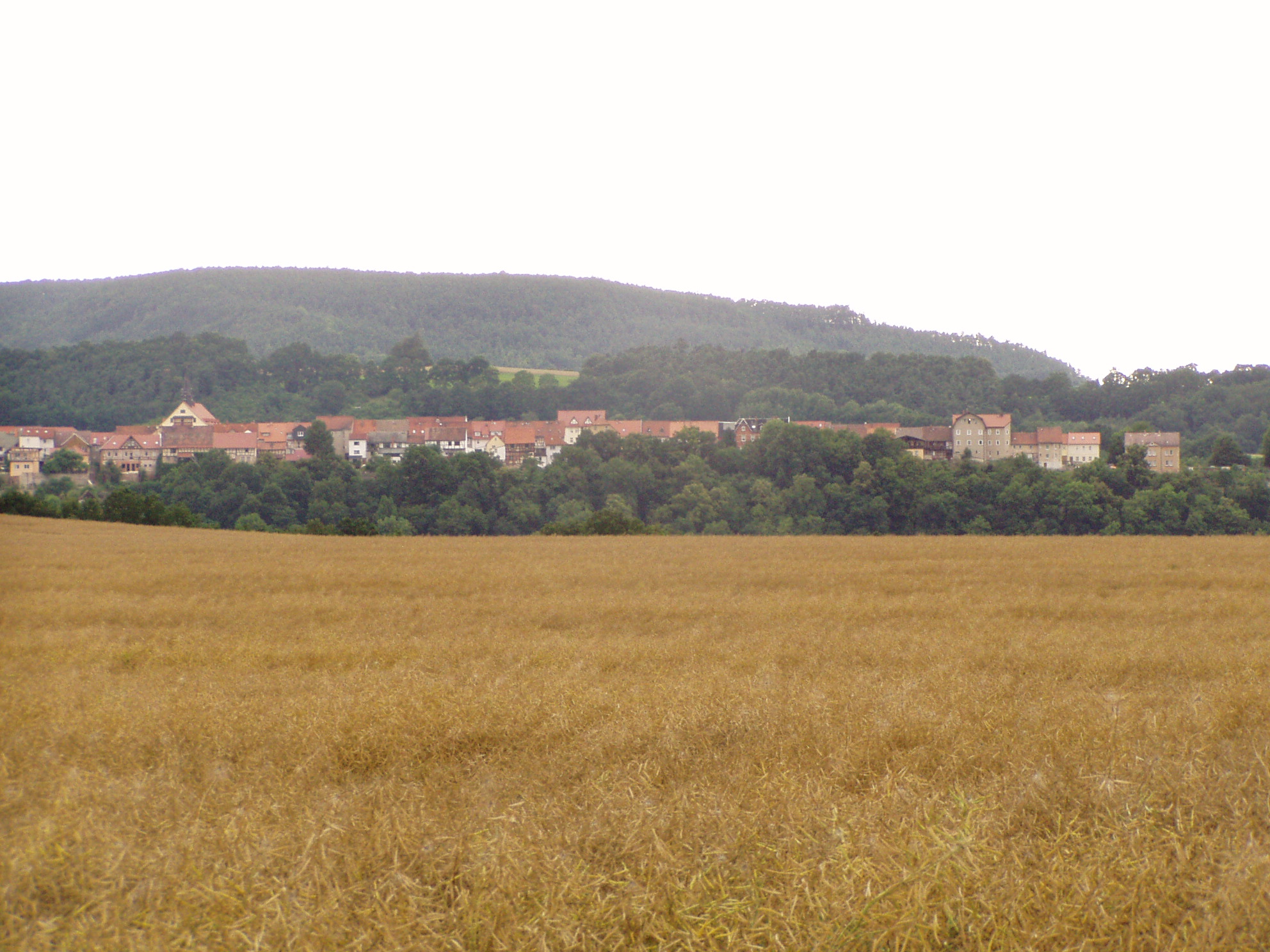 Orlamünde in Thüringen